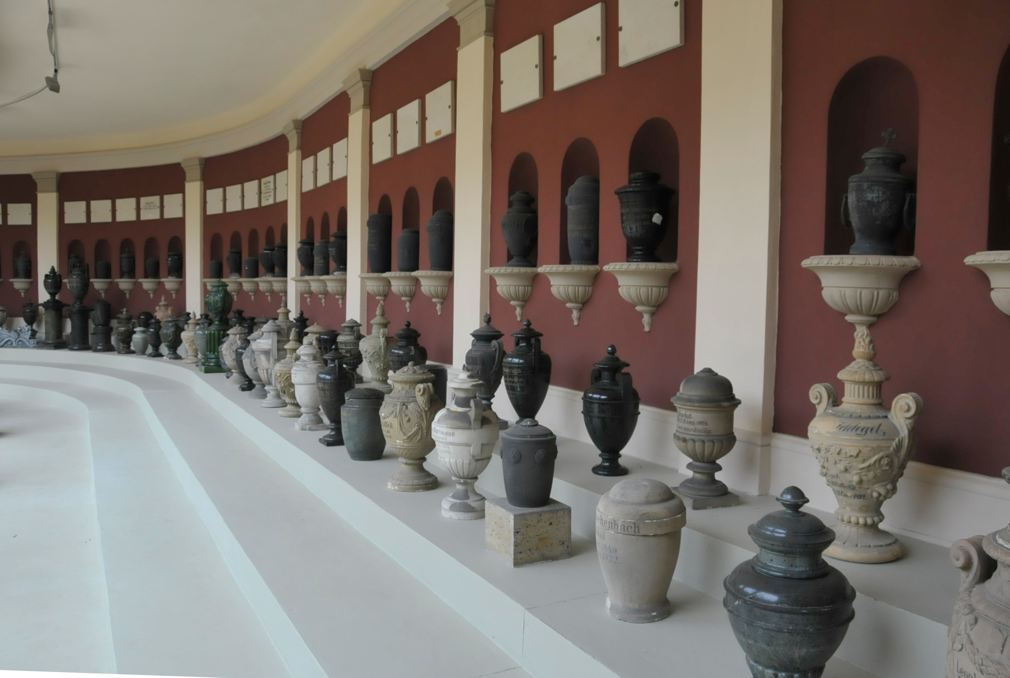 Kolumbarium in Gotha